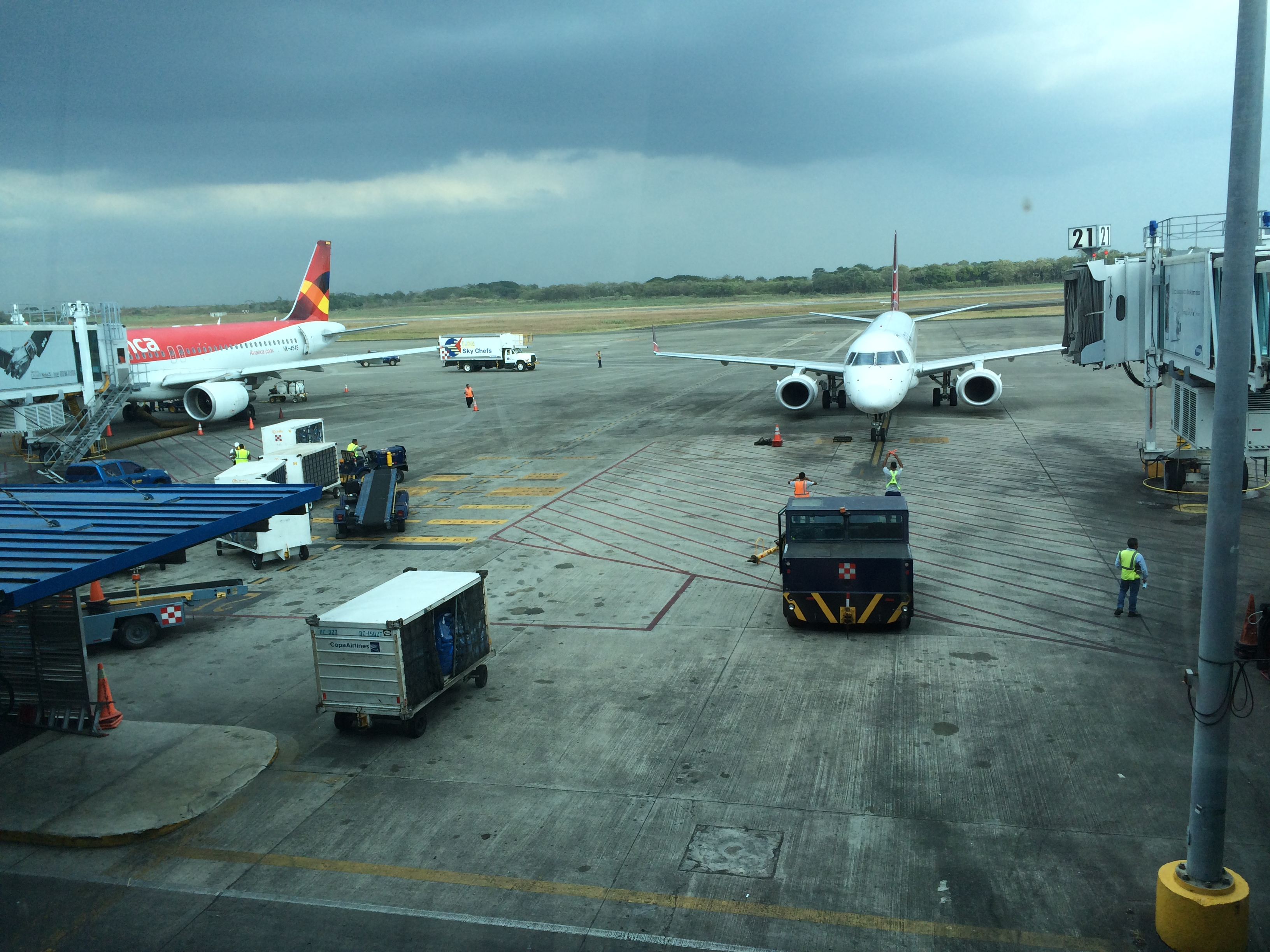 Aviones en el Aeropuerto Internacional de Panamá.